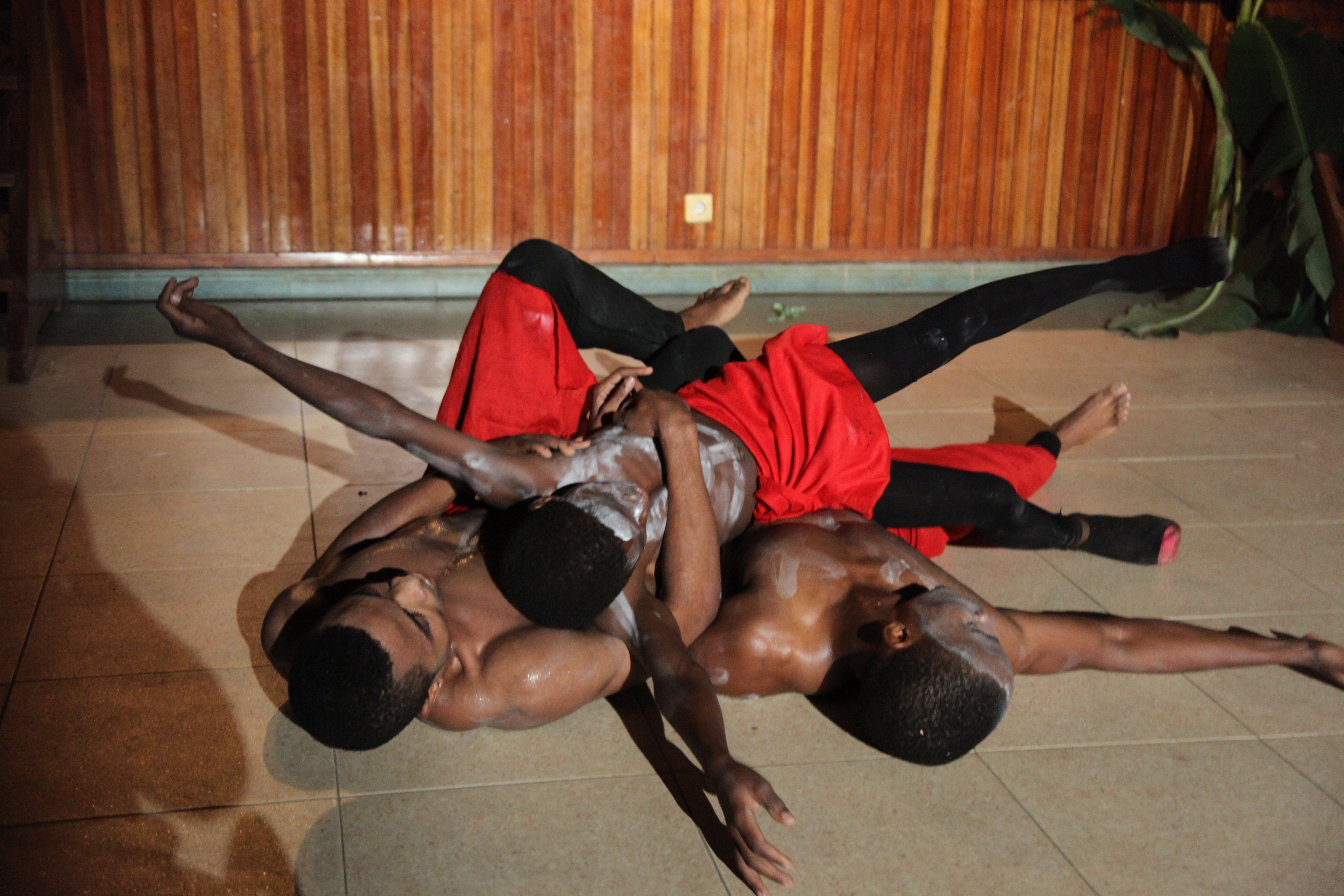 Danza tradicional de Guinea Ecuatorial interpretada por el grupo Elat Moyong en el Centro Cultural de España en Malabo. This is an image of "African people at work" from Equatorial Guinea